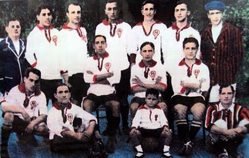 Plantel Huracan 1917; Arriba: Feliciano Medina, Jorge Idiarte, Agustin Alberti, Larmeu y Natalio Carabelli. Abajo: Pedro Martinez, Mario Bassadone, Jose Laguna, Jaime Chavin, Miguel Ginevra y Francisco Pazos.